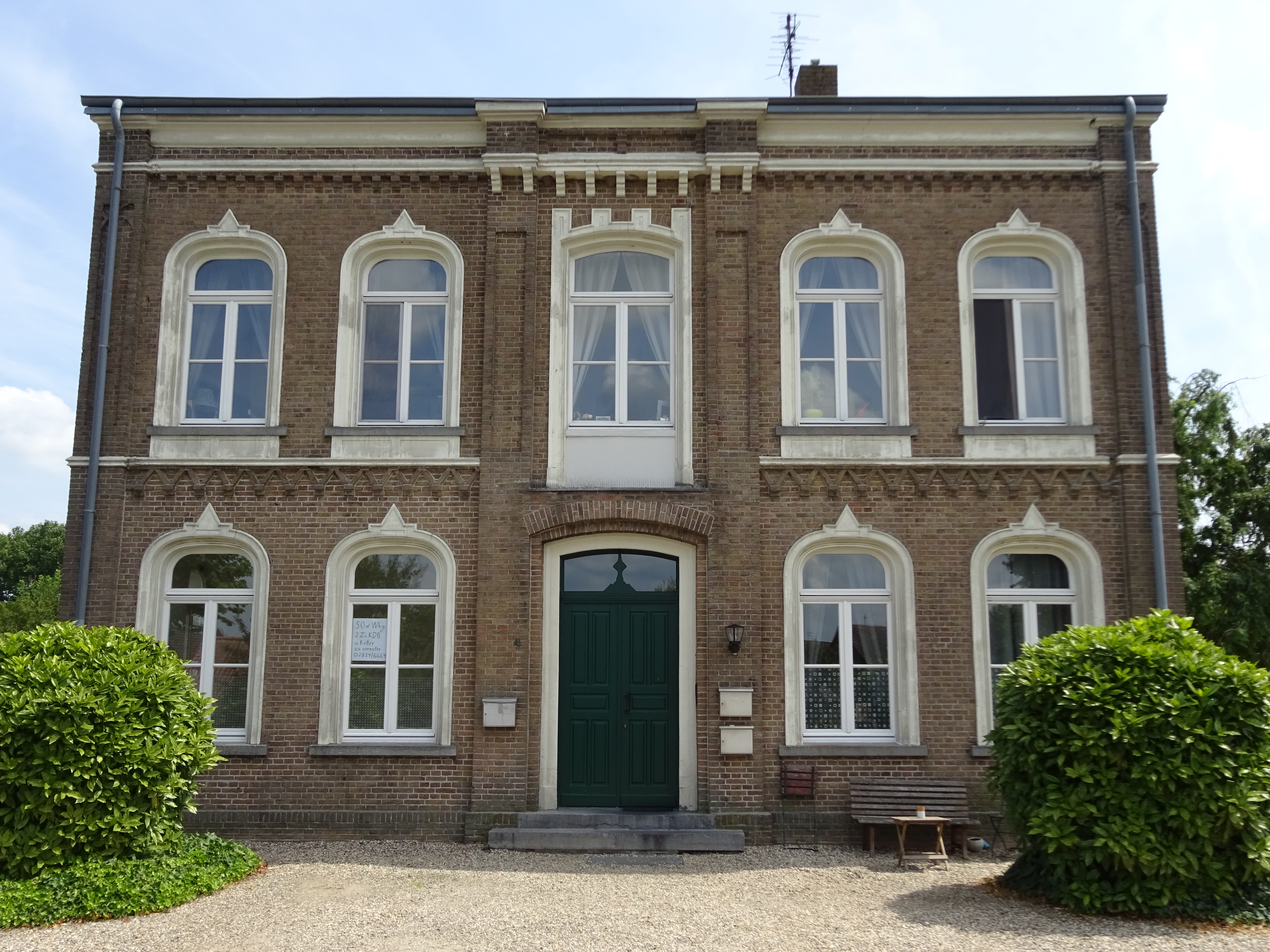 Wohnvilla am Schuldamm 4 in Kalkar-Grieth, erbaut in 1872 vom Eigentümer der Ölmühle. Mittelflurhaus